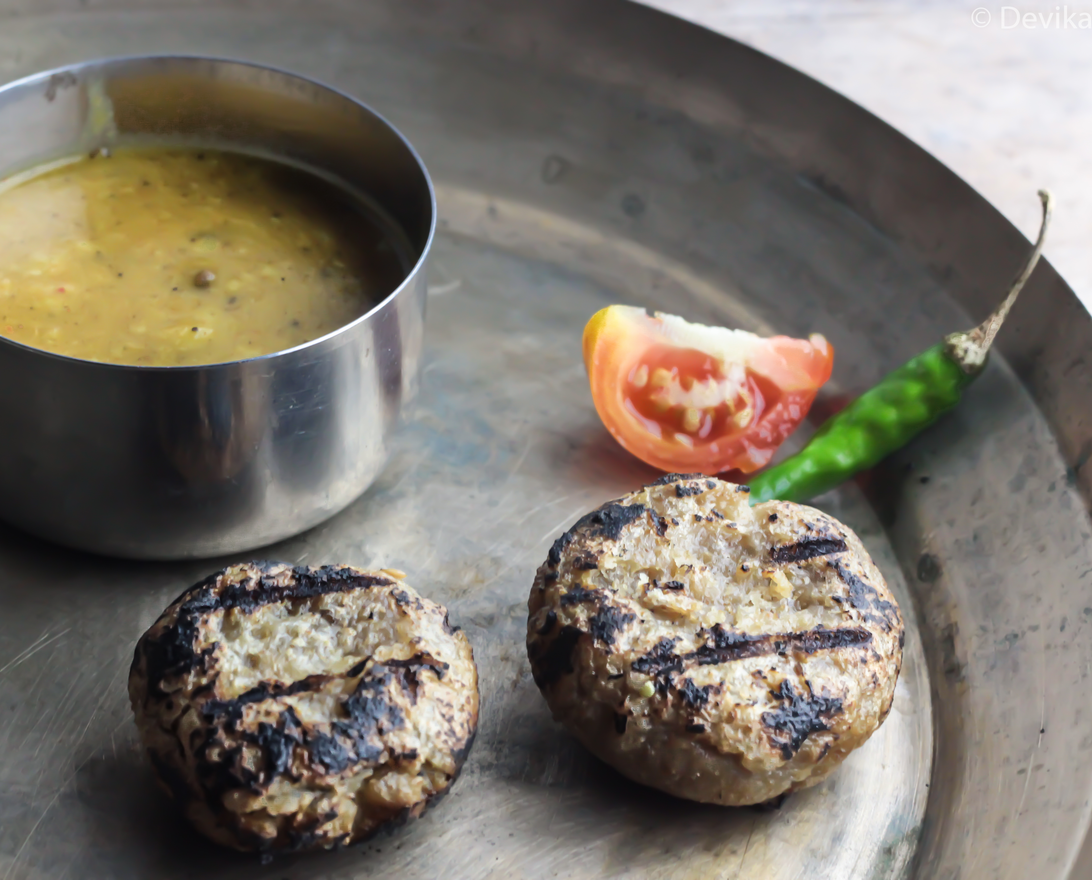 daal_baati